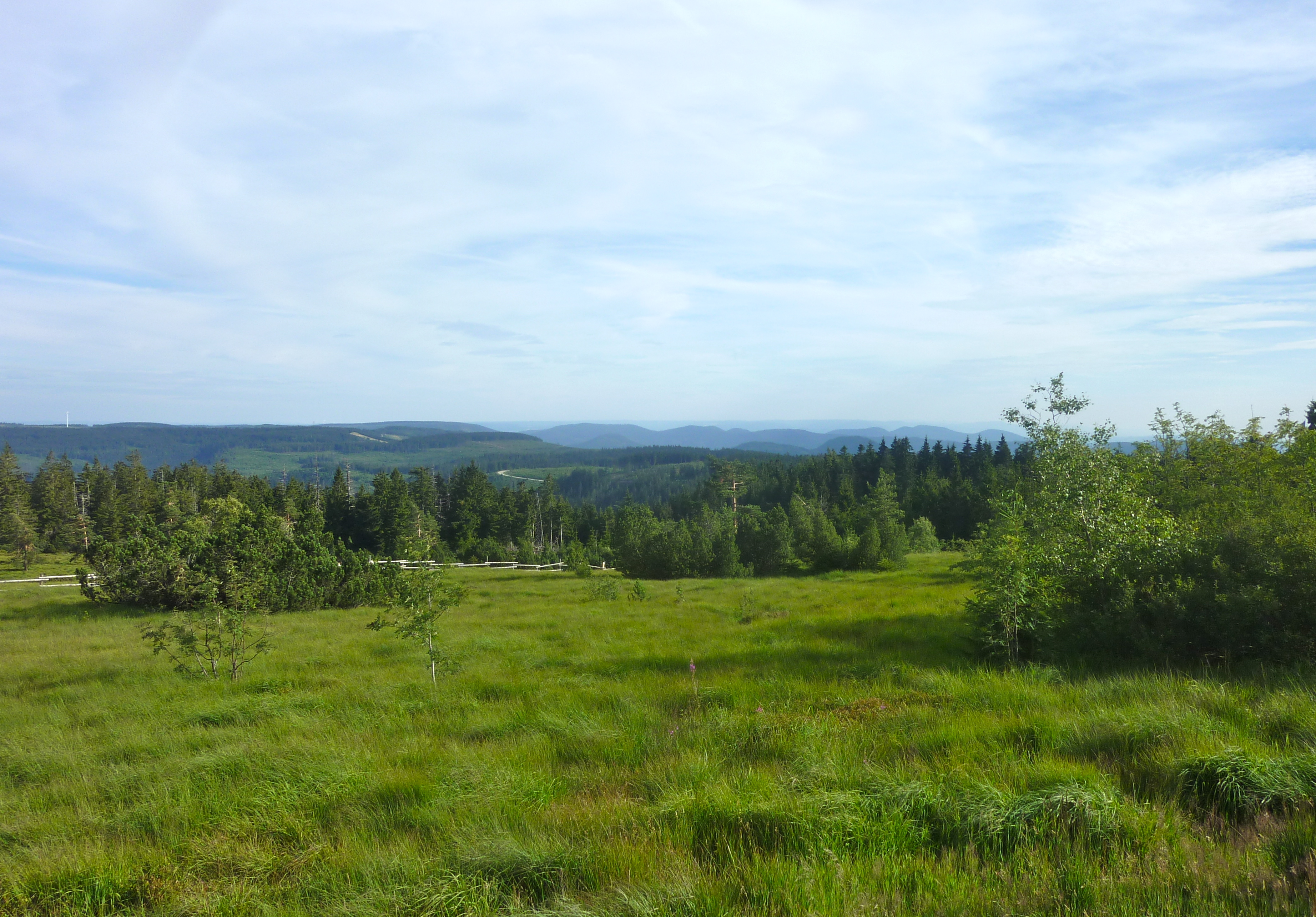 Schliffkopf: Blick nach Süden